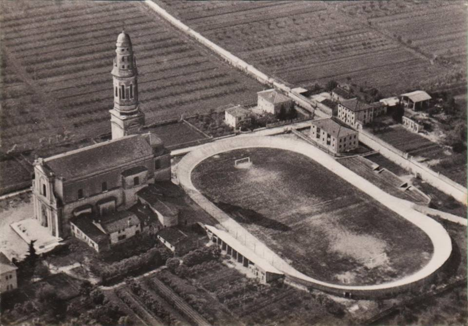 Velodromo di Pescantina (provincia di Verona) in una foto d'epoca.